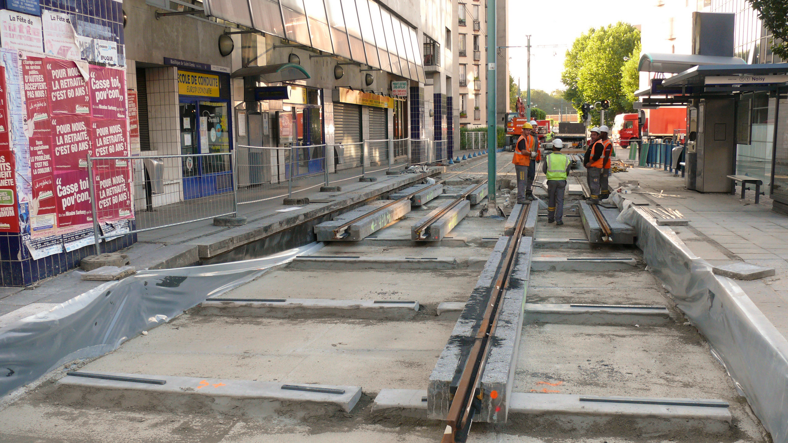 Ligne 1 du tramway d'Île-de-France : Chantier de renouvellement des voies à la station Basilique de Saint-Denis Il s'agit d'une pose antivibratile renforcée en raison de la proximité des immeubles